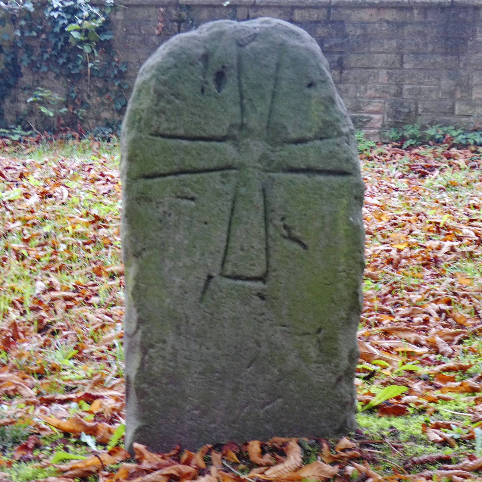 Die Kreuzsteine, oder früher die 5 Steine, sind eine Gruppe von Kreuzsteinen in Hiddestorf, einem Stadtteil von Hemmingen in der Region Hannover in Niedersachsen